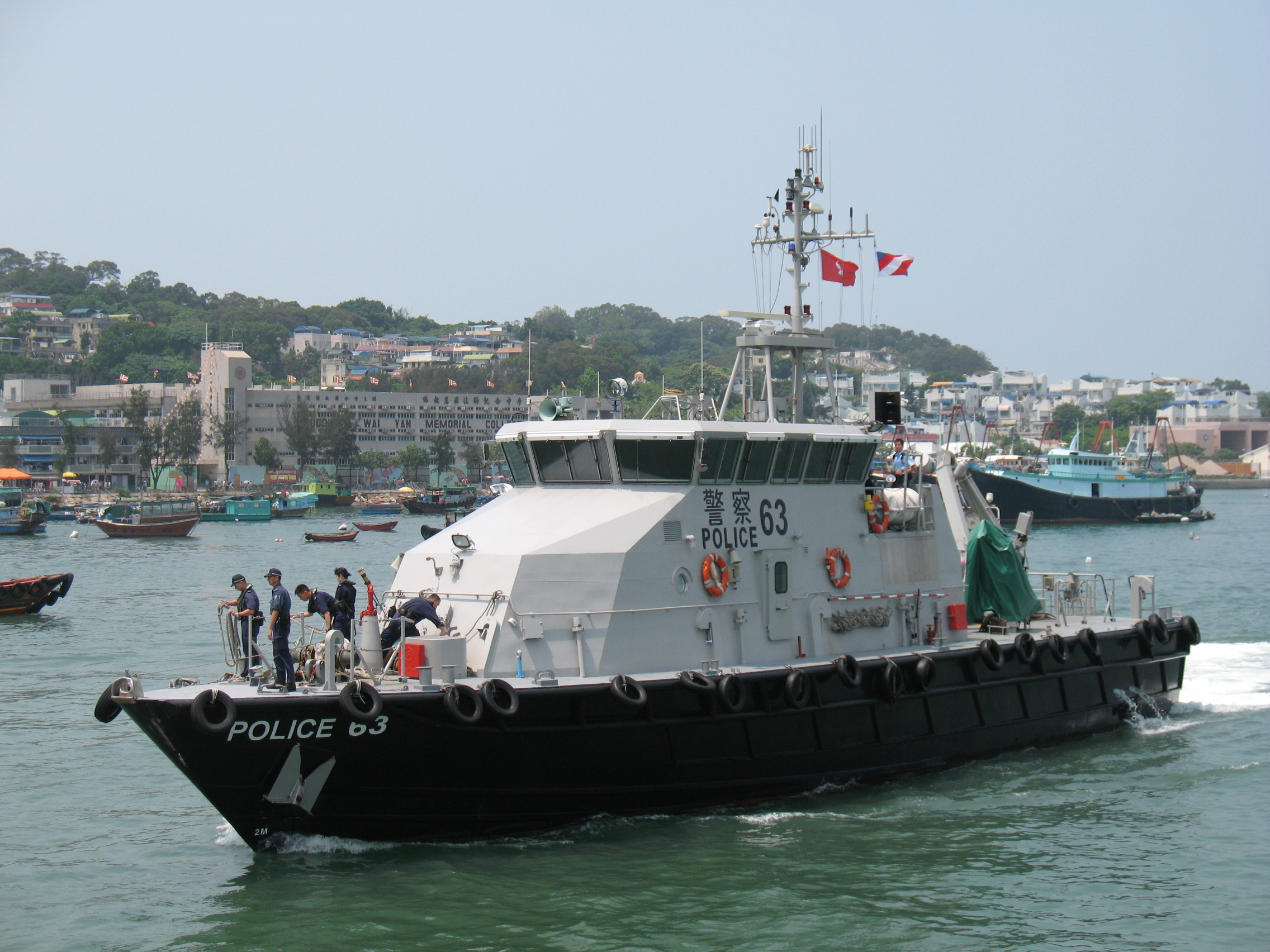 中文（香港）: 一艘千禧年代建造型號的「健警型Keka」巡邏水警輪六十三號，正在駛入長洲避風塘內。